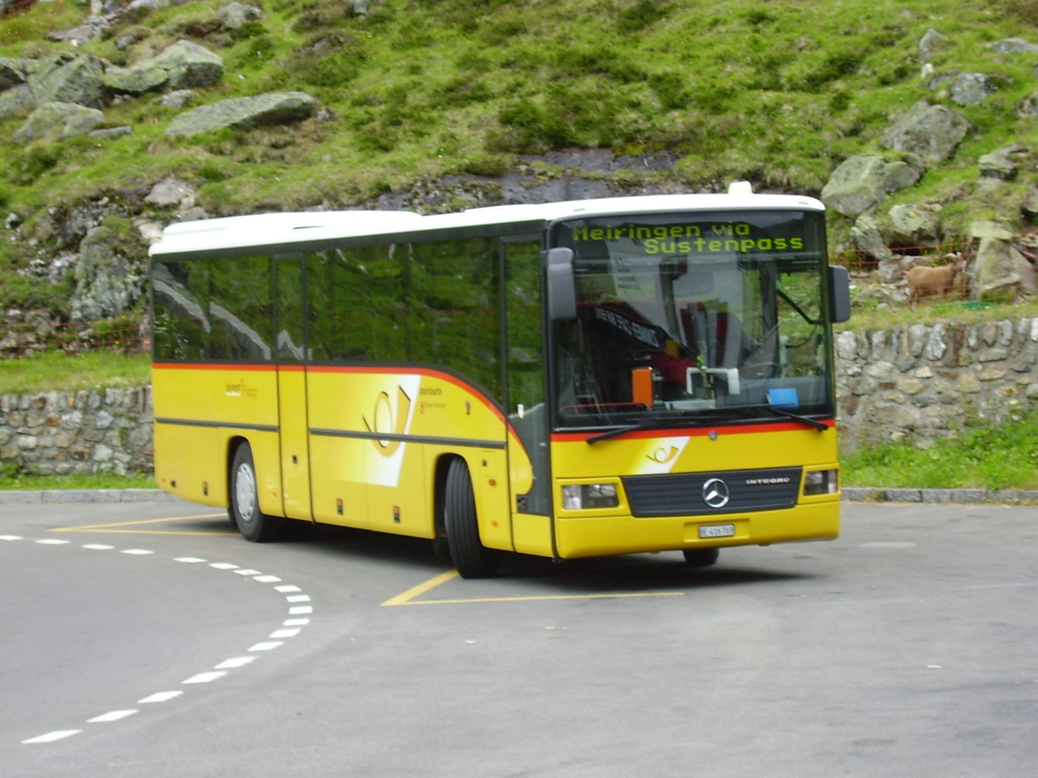 Description: Postauto bei der Haltestelle Steingletscher auf dem Sustenpass Source: selbstfotografiert Date: 21.07.05 Author: Roman Vogler